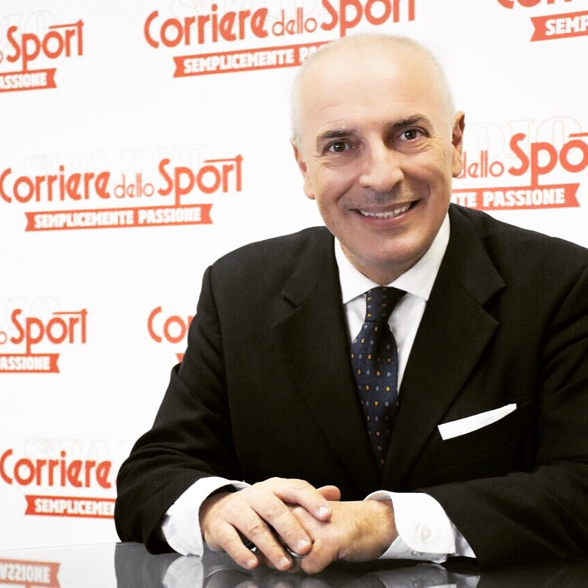 Giornalista